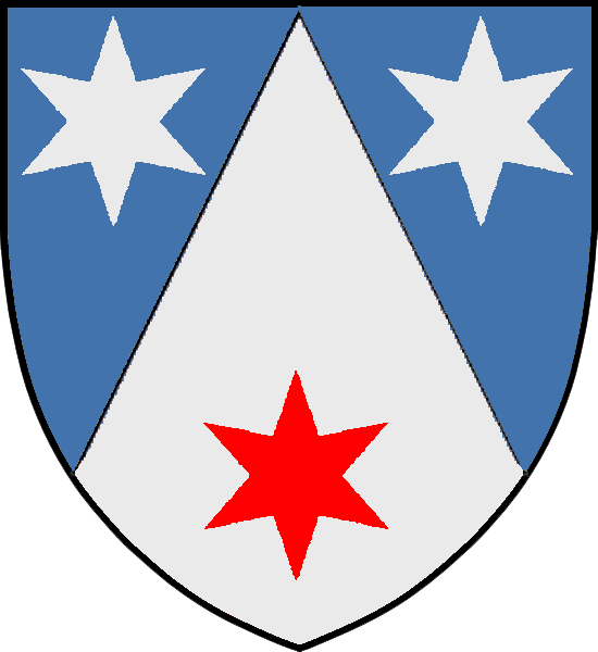 Vapensköld för adelsätten Benzelstierna